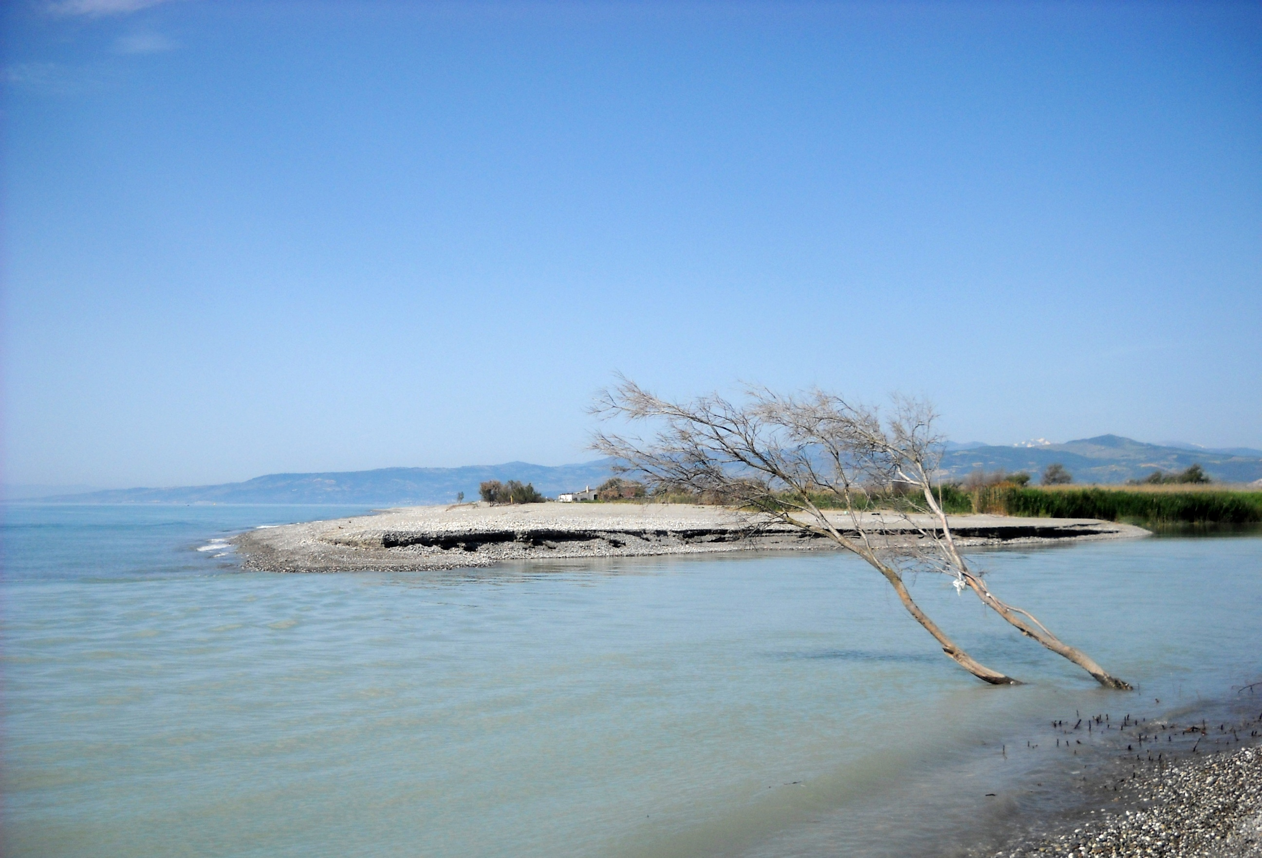 Veduta della foce del fiume Sinni (lungo 94km) che si trova nei pressi di Policoro, in Basilicata.